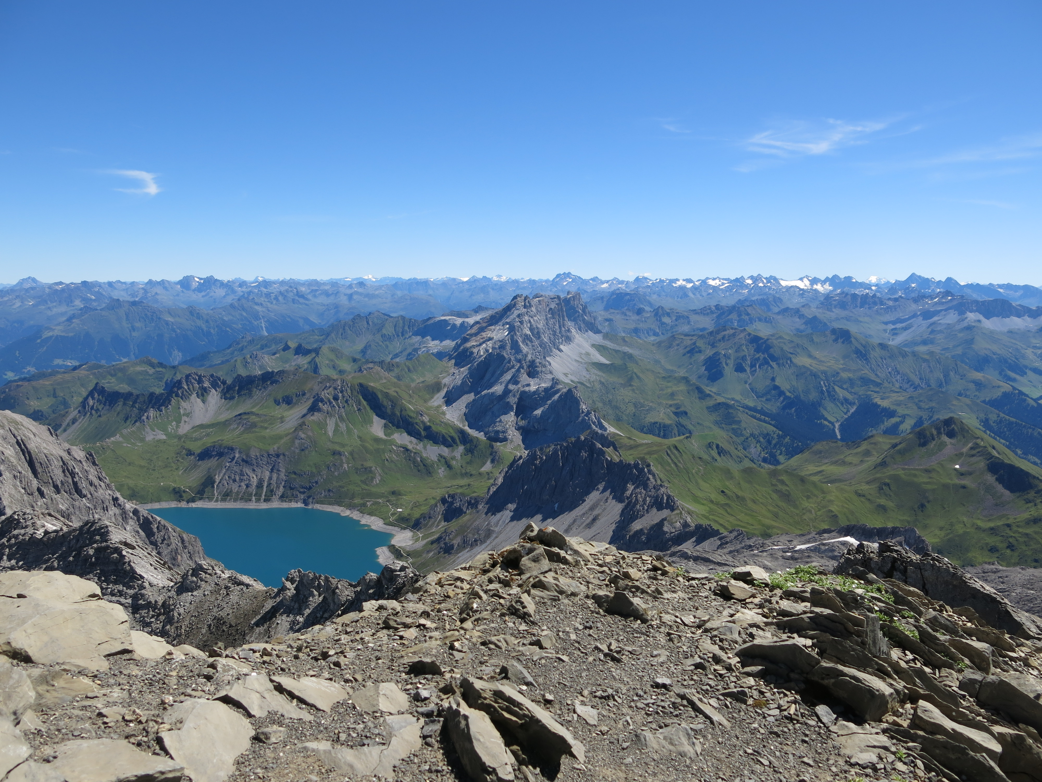 Blick vom Gipfel der Schesaplana nach Osten in Richtung Lünersee und Silvretta.